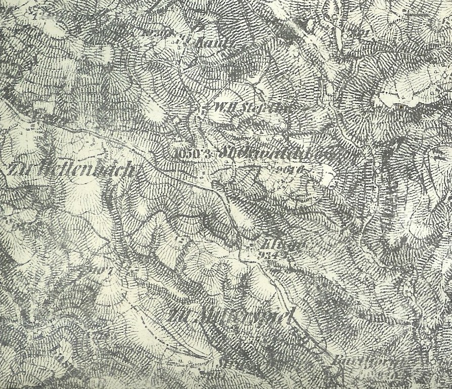 Umgebung von St. Oswald Ende 19. Jh. Gemeinde Mitterspiel bis südlich von St. Oswald. Ausschnitt aus einem Meßtischblatt der francisco-josephinischen Landesaufnahme ca. Ende 19. Jh. Originalmaßstab 1:25.000, diente als Vorlage für die Karten 1:75.000